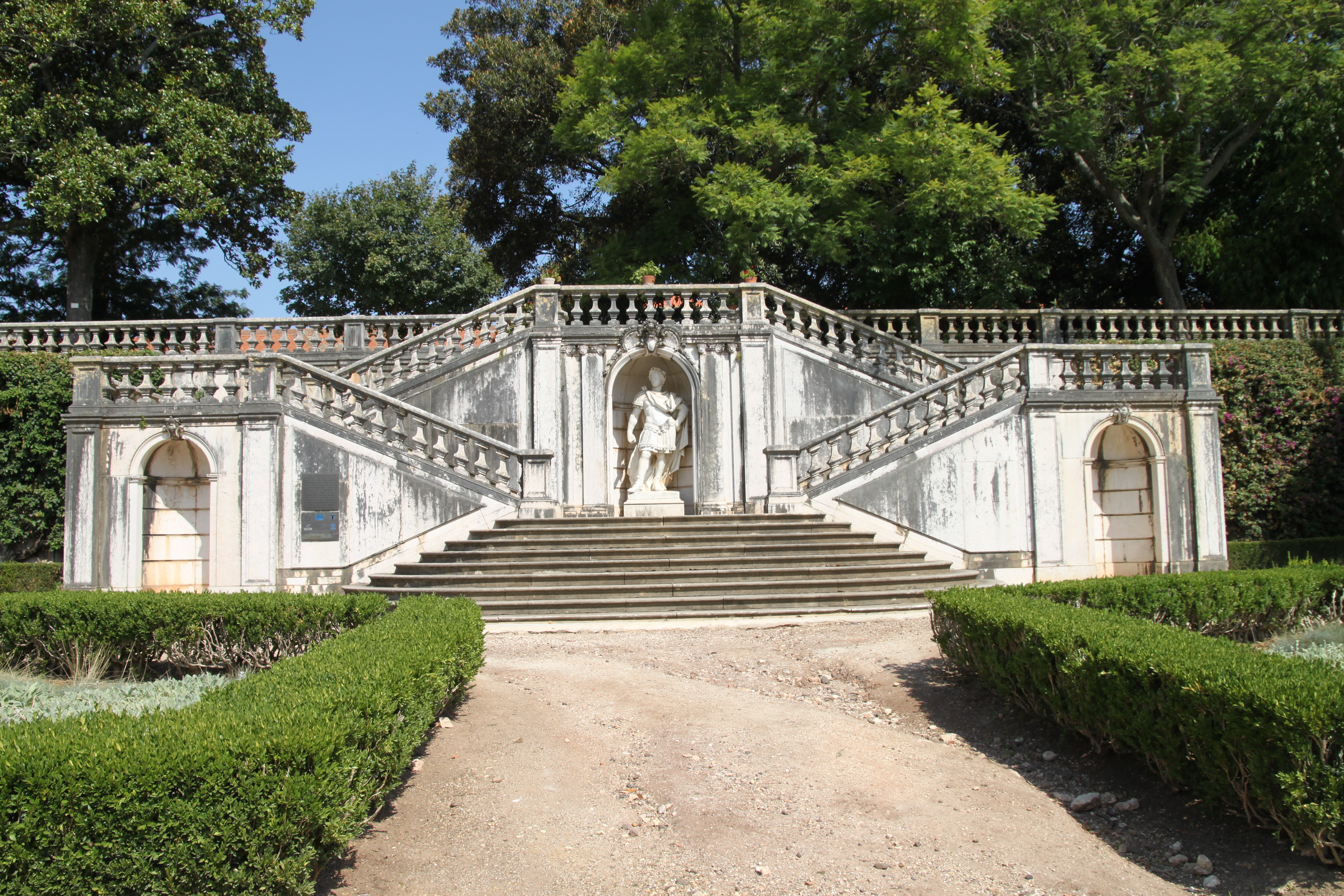 Zona circundante do Palácio Nacional da Ajuda This file was uploaded for Wiki Loves Monuments in Portugal with the unique identifier 72758.